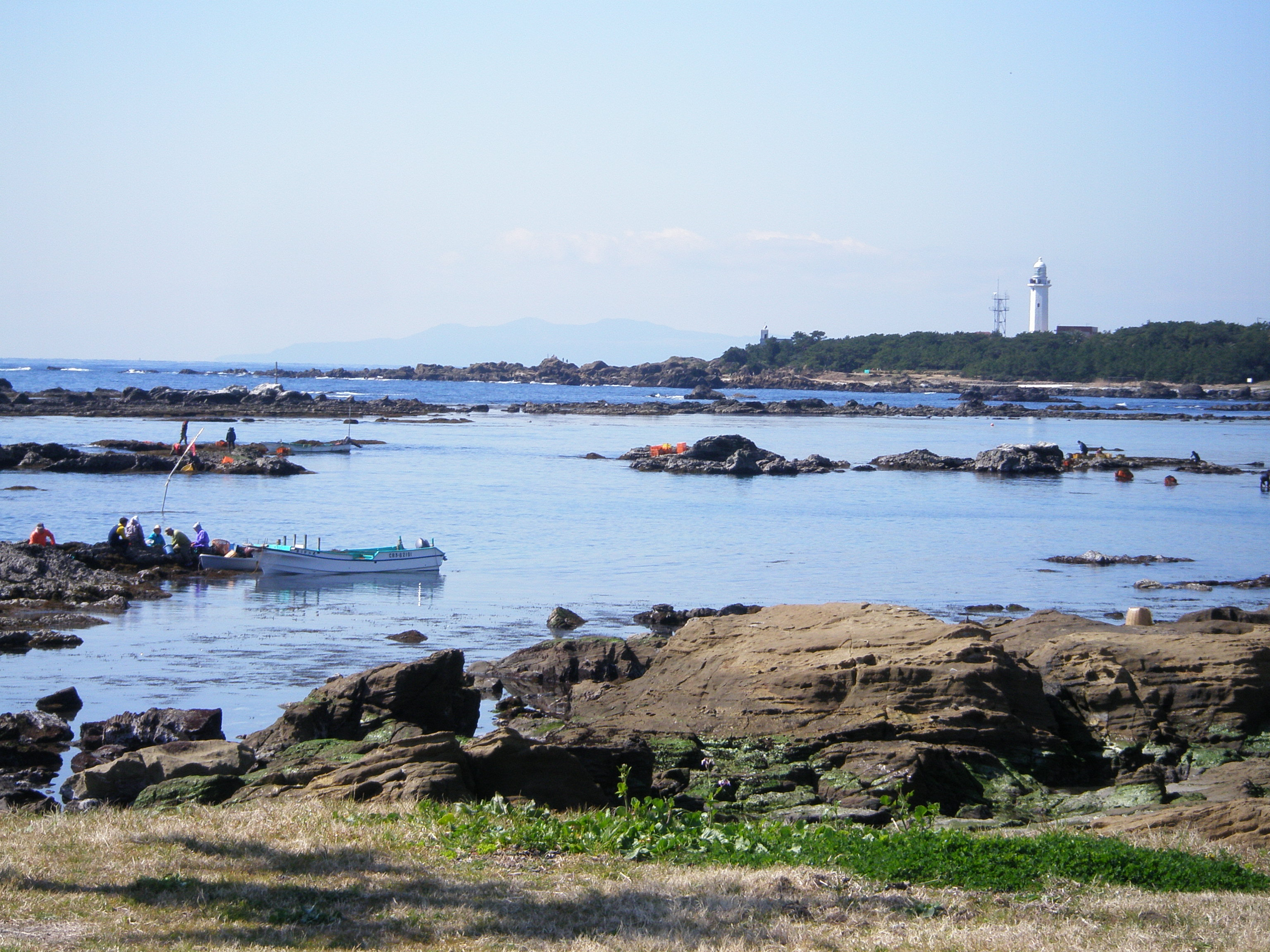 千葉県南房総市白浜、野島崎を望む。